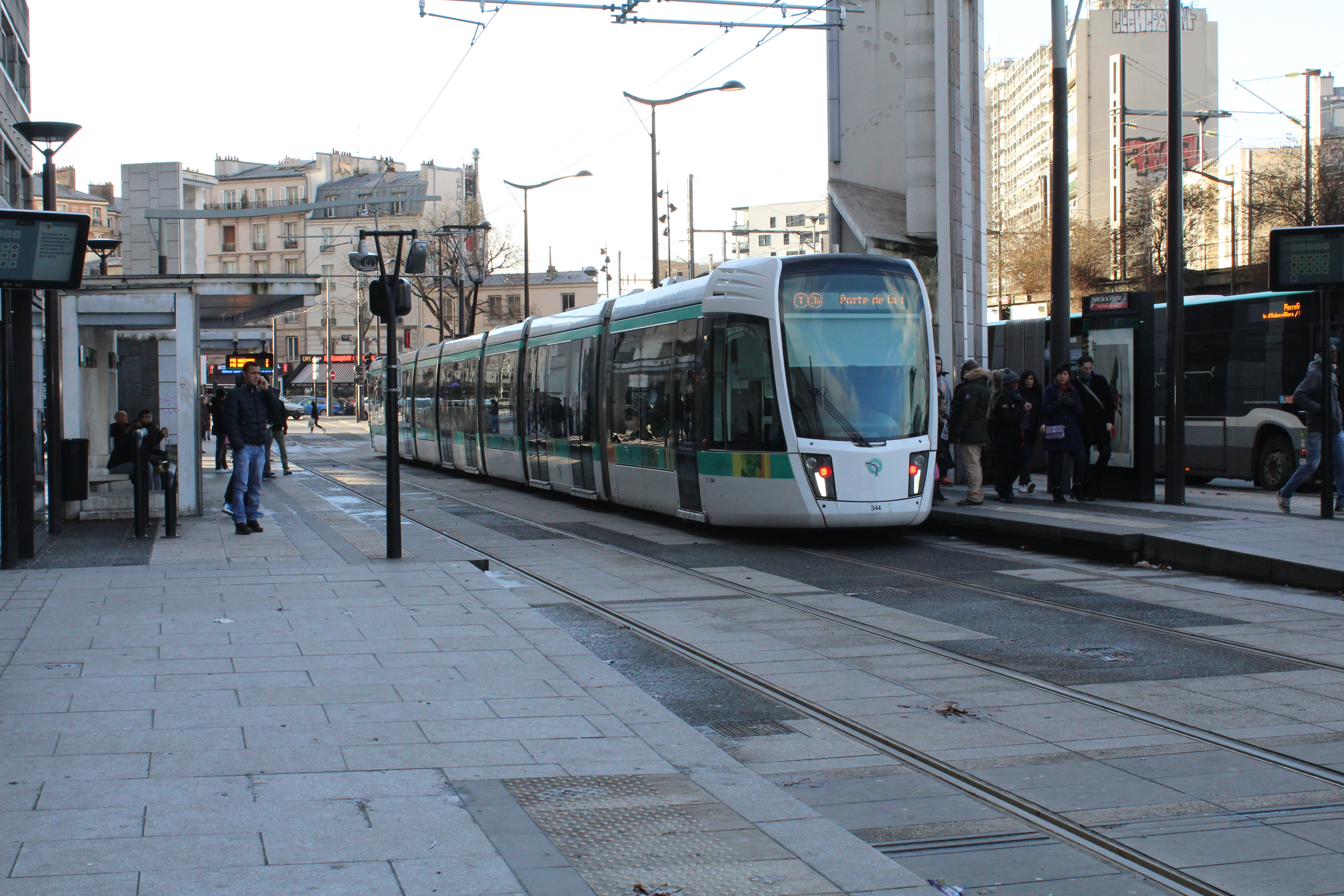 Station de tramway Porte de la Villette sur la ligne 3b du tramway d'Île-de-France.